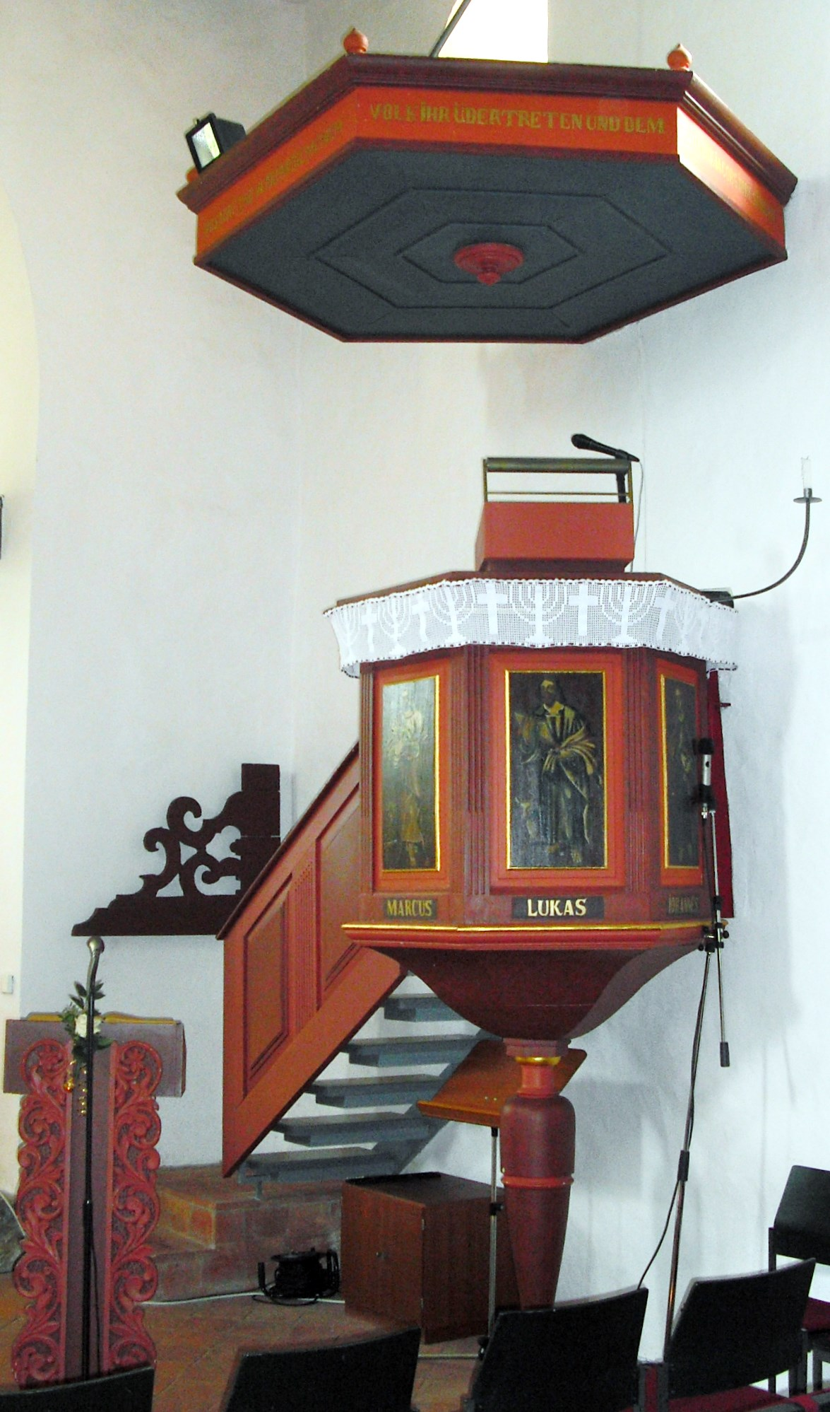 Evangelisch-lutherische Kirche in Middels (Stadtteil von Aurich, Landkreis Aurich, Niedersachsen, Deutschland): Kanzel